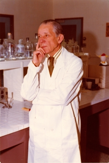 Le Dr. Frappier en sarrau dans un des laboratoires de son Institut.